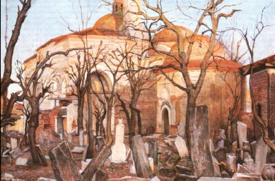 Şehabettin Imaret mosque in Plovdiv, Bulgaria